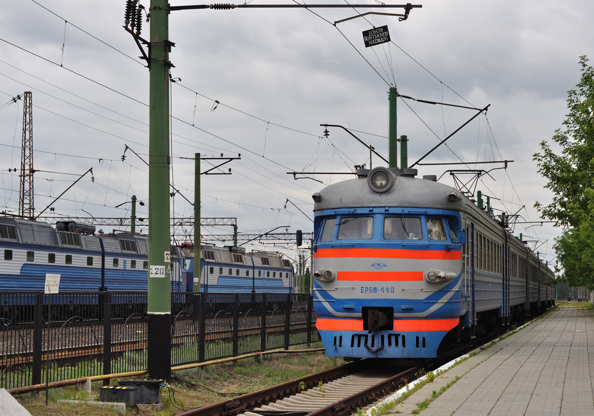 Электровозы постоянного тока ЧС7 и электропоезд переменного тока ЭР9П на станции Святогорск, Донецкая область, Украина